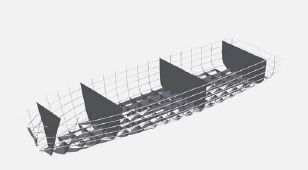 Constructie schotten schip